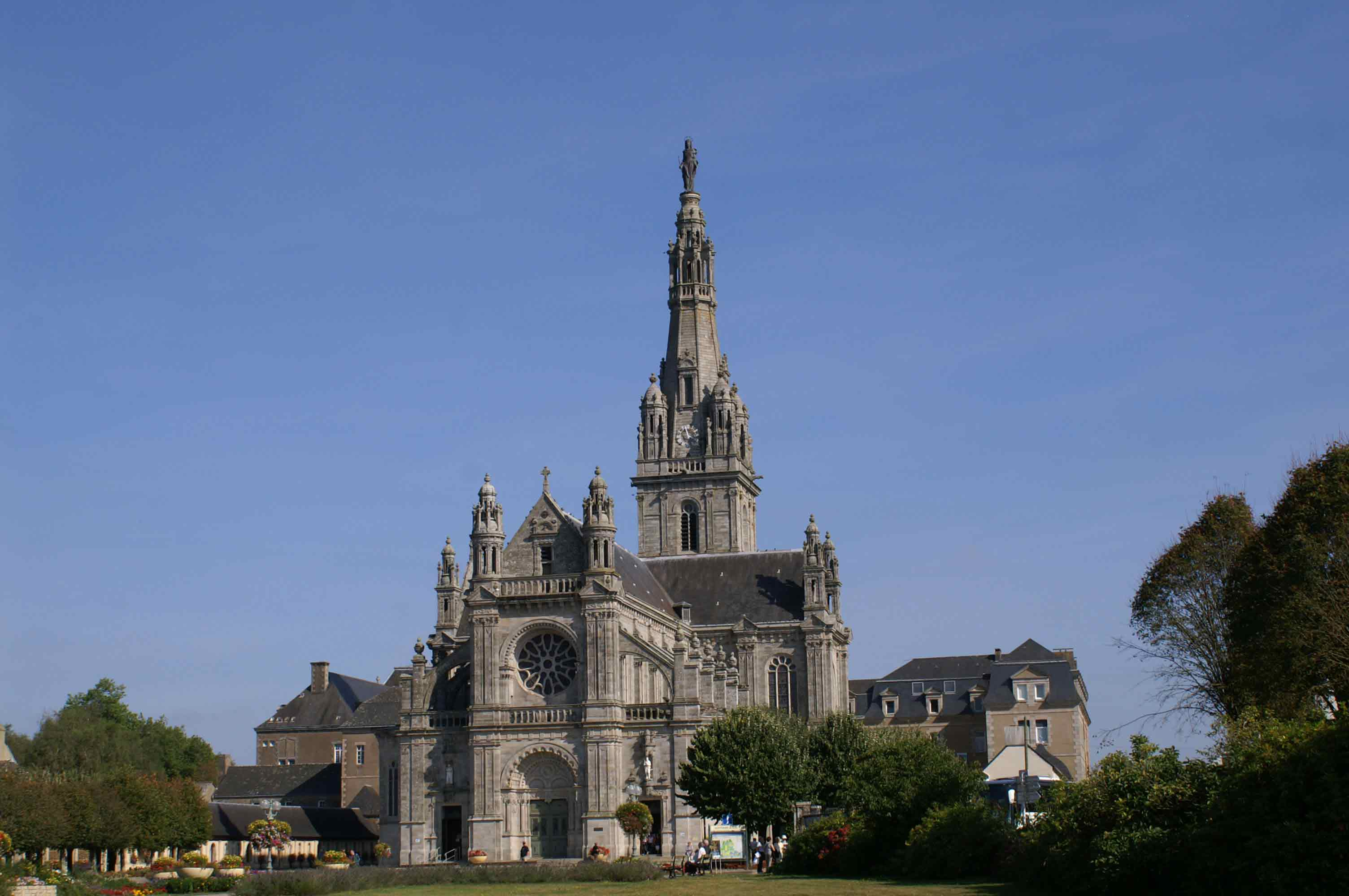 Sanctuaire de Sainte-Anne d'Auray, au centre la basilique.